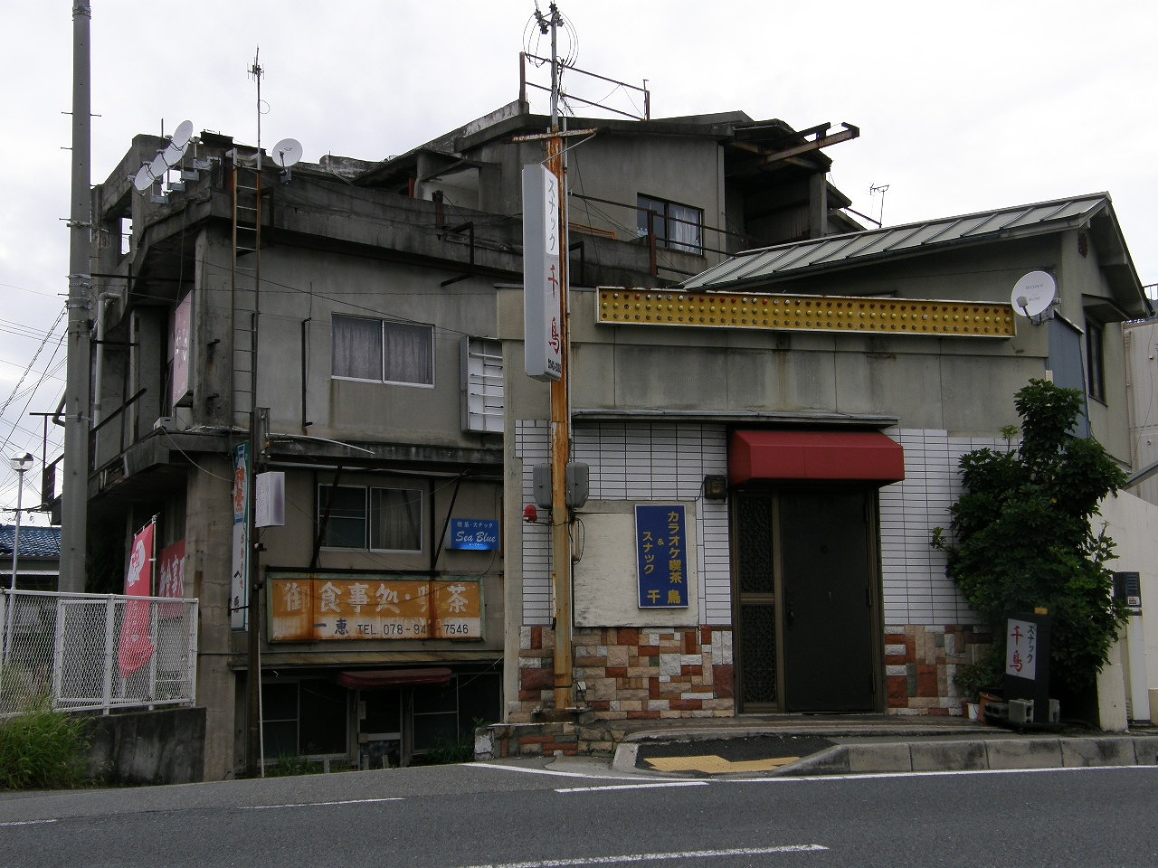 雑居ビル（ざっきょビル）とは、不特定多数の業種、業態の店（テナント）が多数混在するビルのこと。詳細はw:ja:雑居ビルを参照。